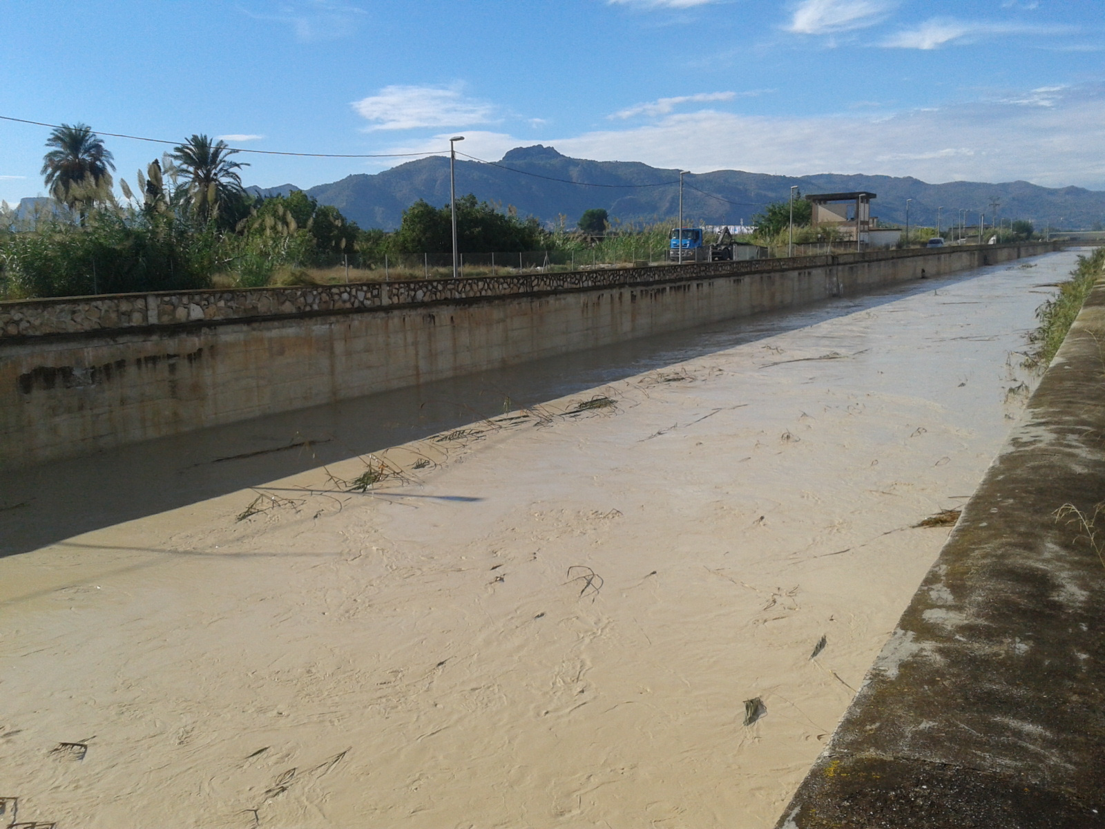 Río Guadalentín por el canal del Reguerón, a su paso por Beniaján. Riada de septiembre de 2012.